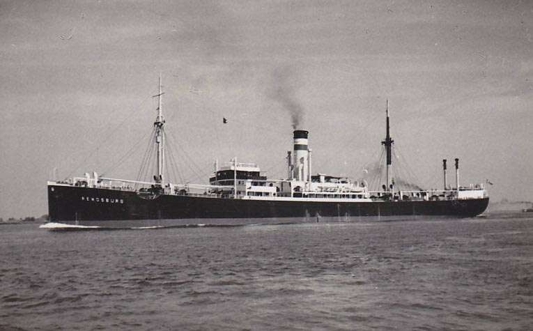 Der Motorfrachter Rendsburg der Hapag